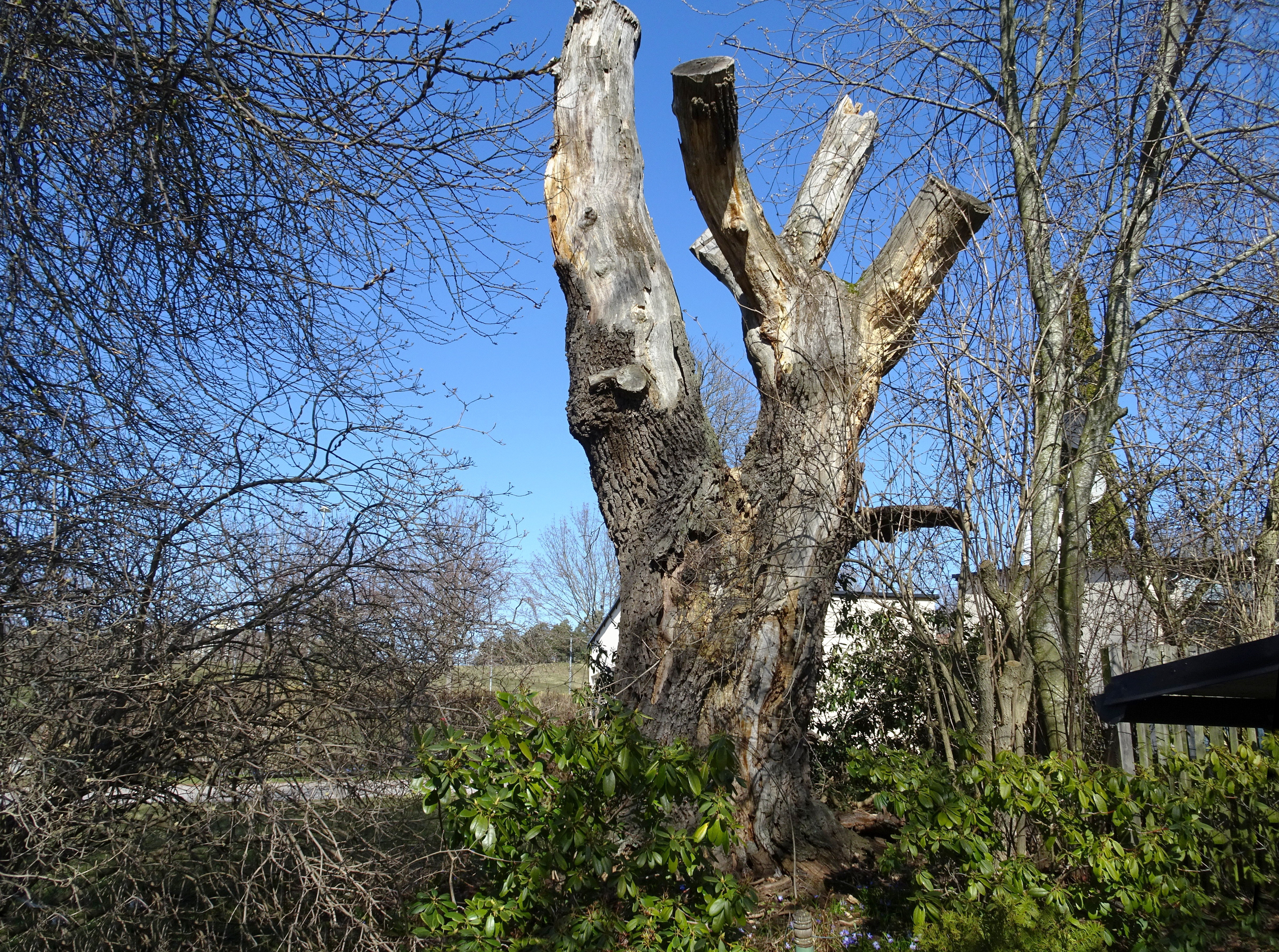 Naturminne "Berzelii ek" i Kevinge, Danderyds kommun